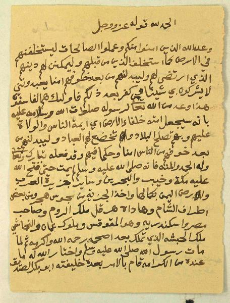 تفسير وعد الله الذين آمنوا منكم من تفسير ابن كثير